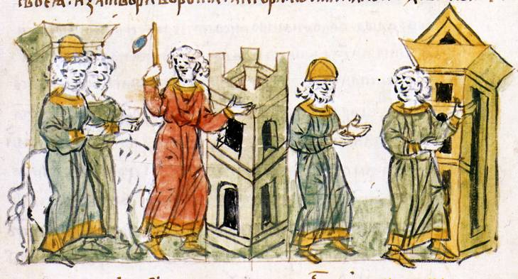 Убийство киевлянами Игоря Ольговича в 1147 / Killing of Igor Olgovith